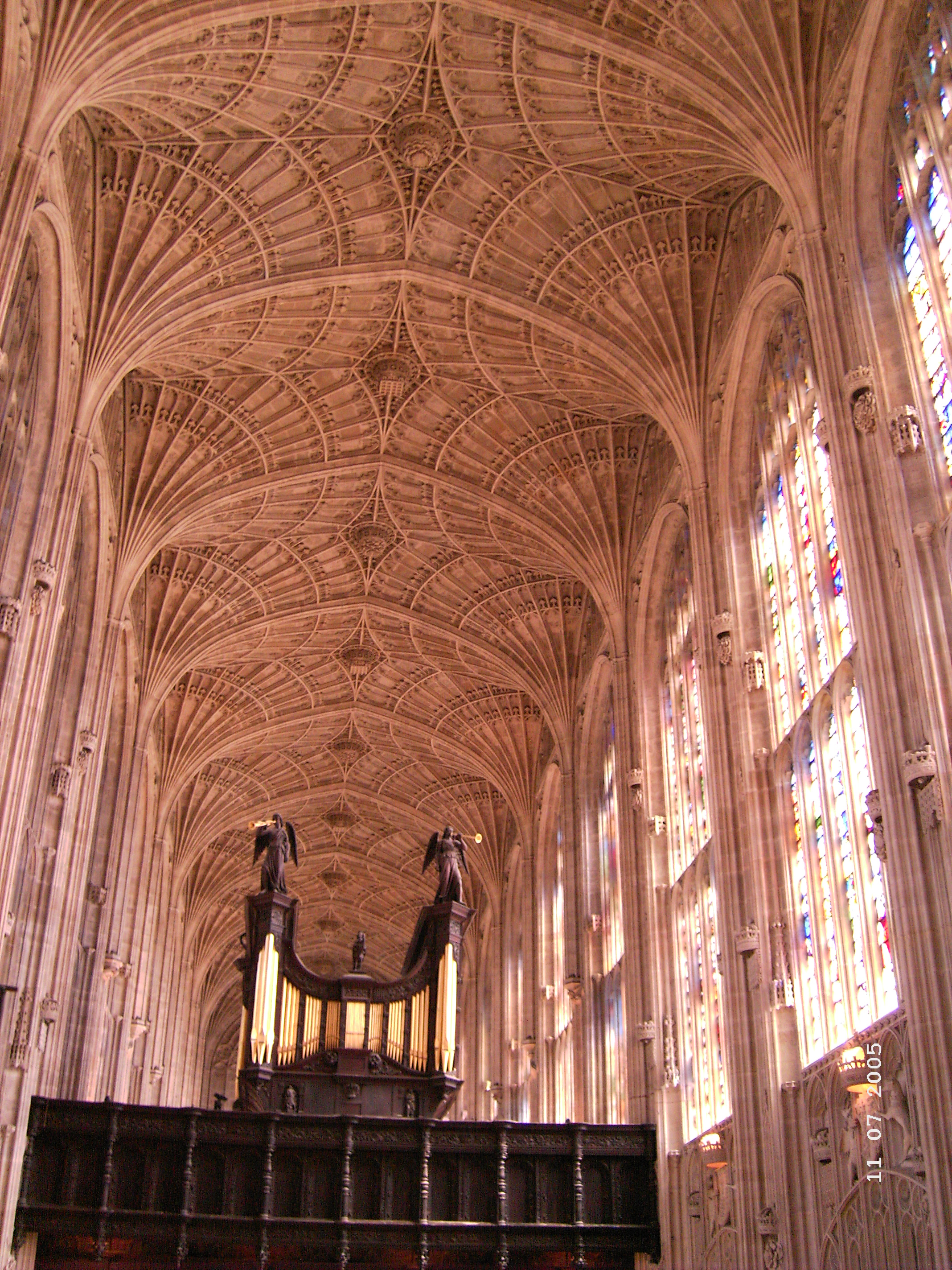 Gewölbe der Kapelle des Kings College in Cambridge